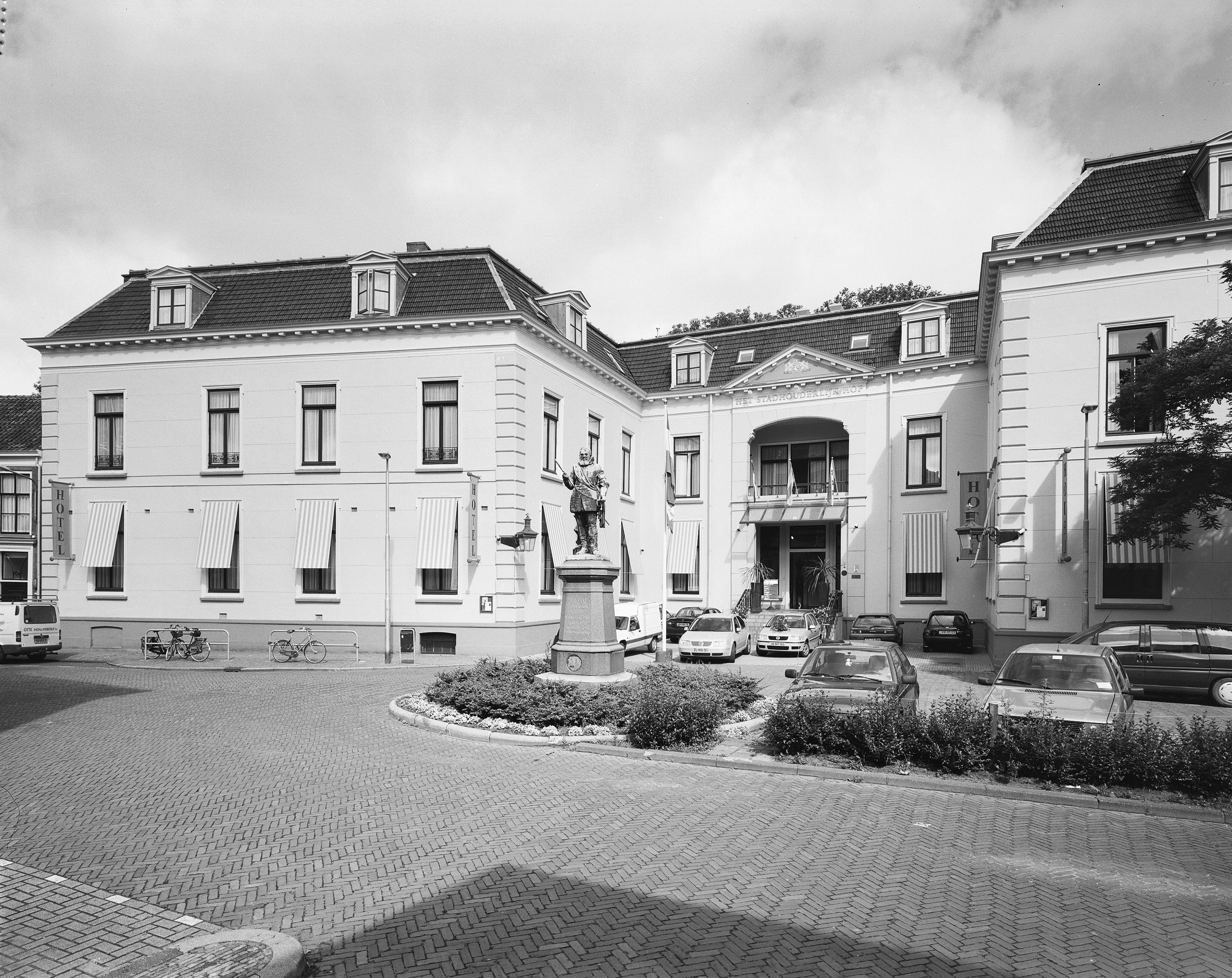 Stadhouderlijk Hof: Overzicht gedeelte voorgevel, thans hotel (opmerking: Gefotografeerd voor Monumenten In Nederland Friesland, bladzijde 204)